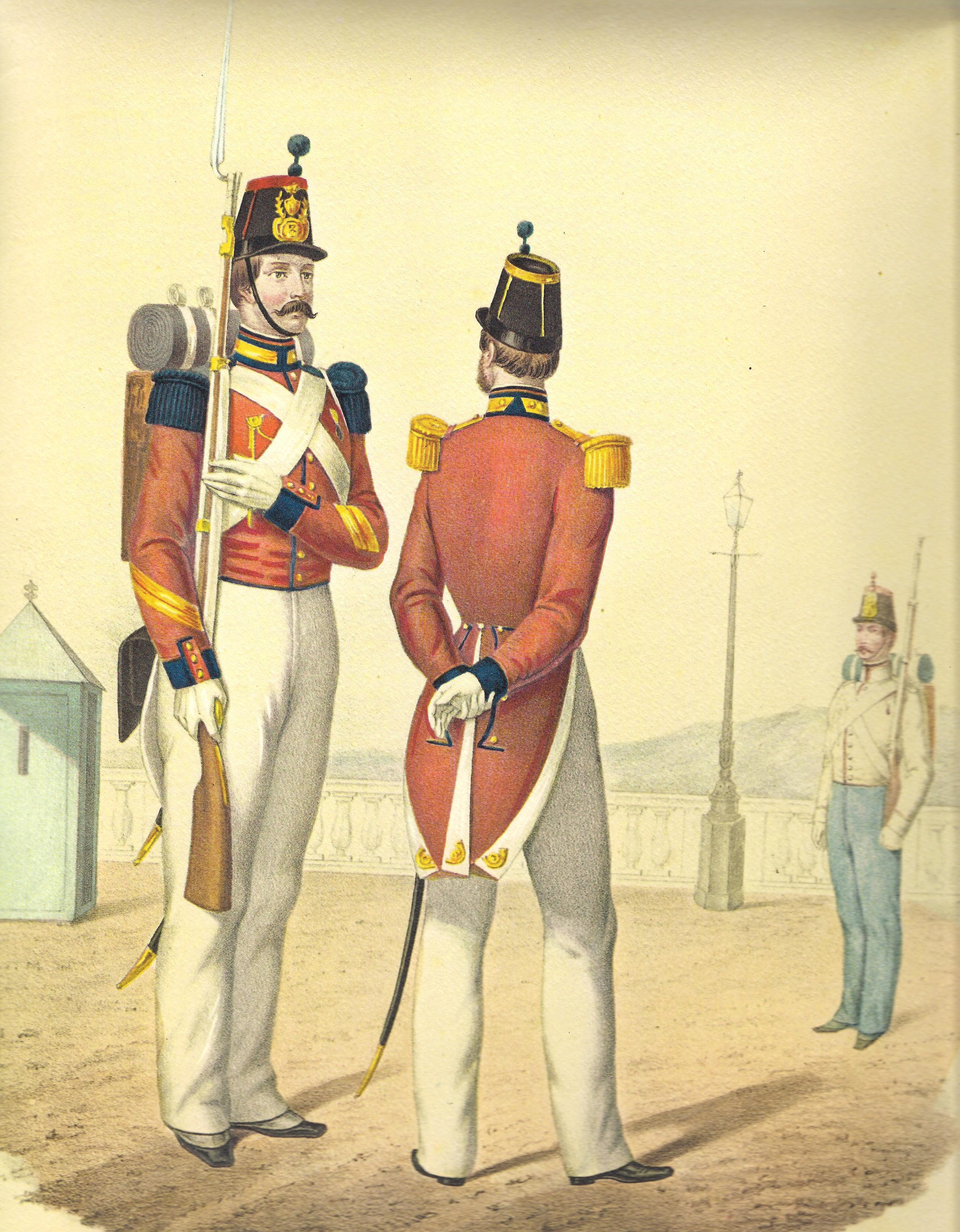 Sottufficiale e ufficiale in gran tenuta del 3º Reggimento Svizzero, Napoli 1854. Immagine tratta da "Schweizer regimenter im dienste des Konigs von Neapel und Beider Sizilien, Antonio Zezon, Napoli 1854"